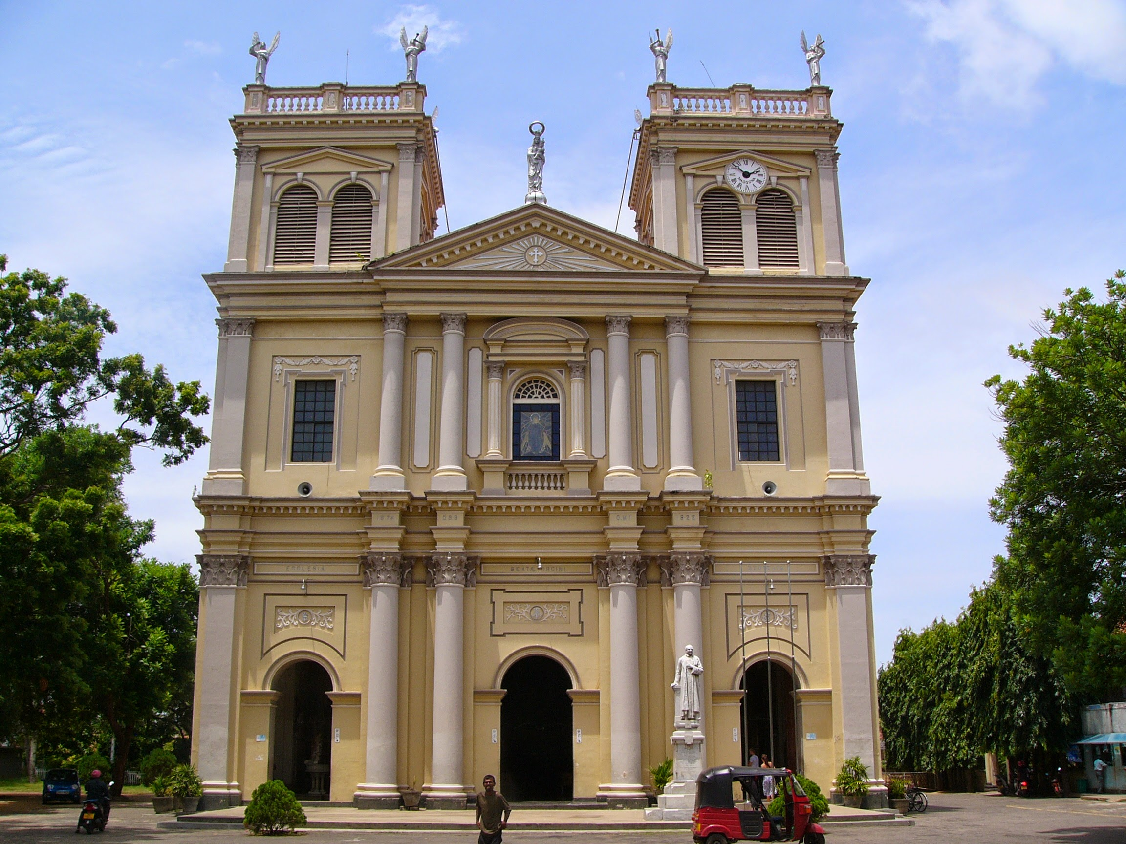 Negombo, Sri Lanka